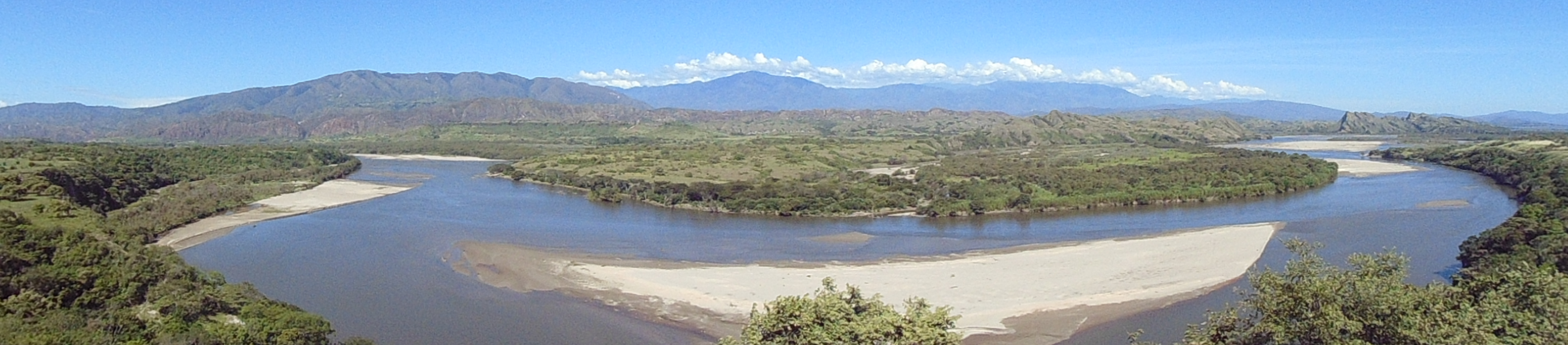 Esta fotografía fue tomada en el municipio colombiano con código 41349.